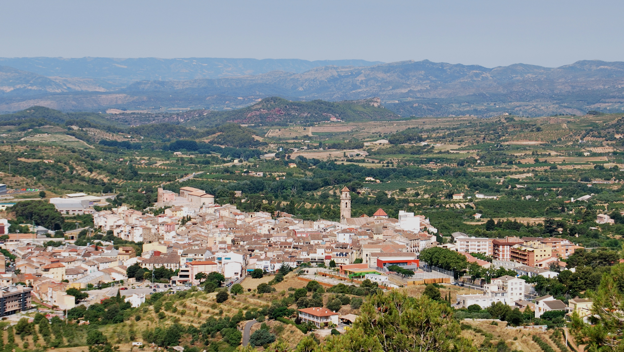 Capital del Priorat